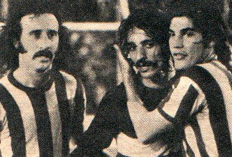 Aldo Poy y Daniel Aricó junto a un futbolista de Boca Juniors.